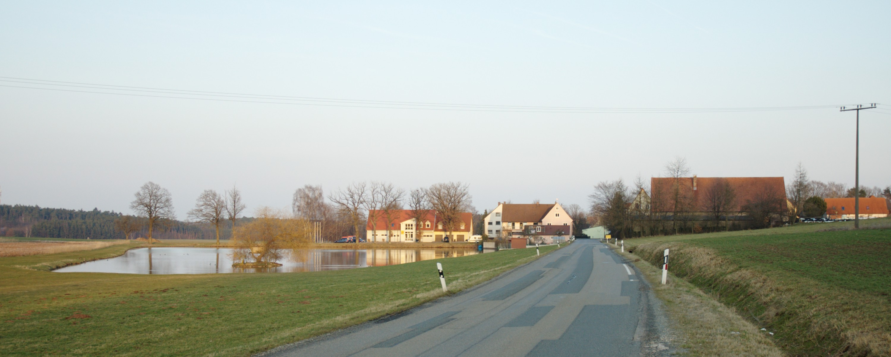 Altendettelsau (Westseite)